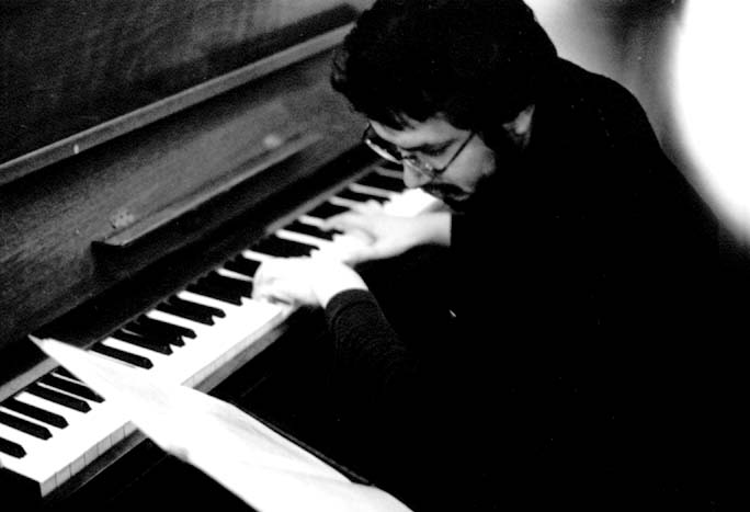 Foto de Rafael Junchaya